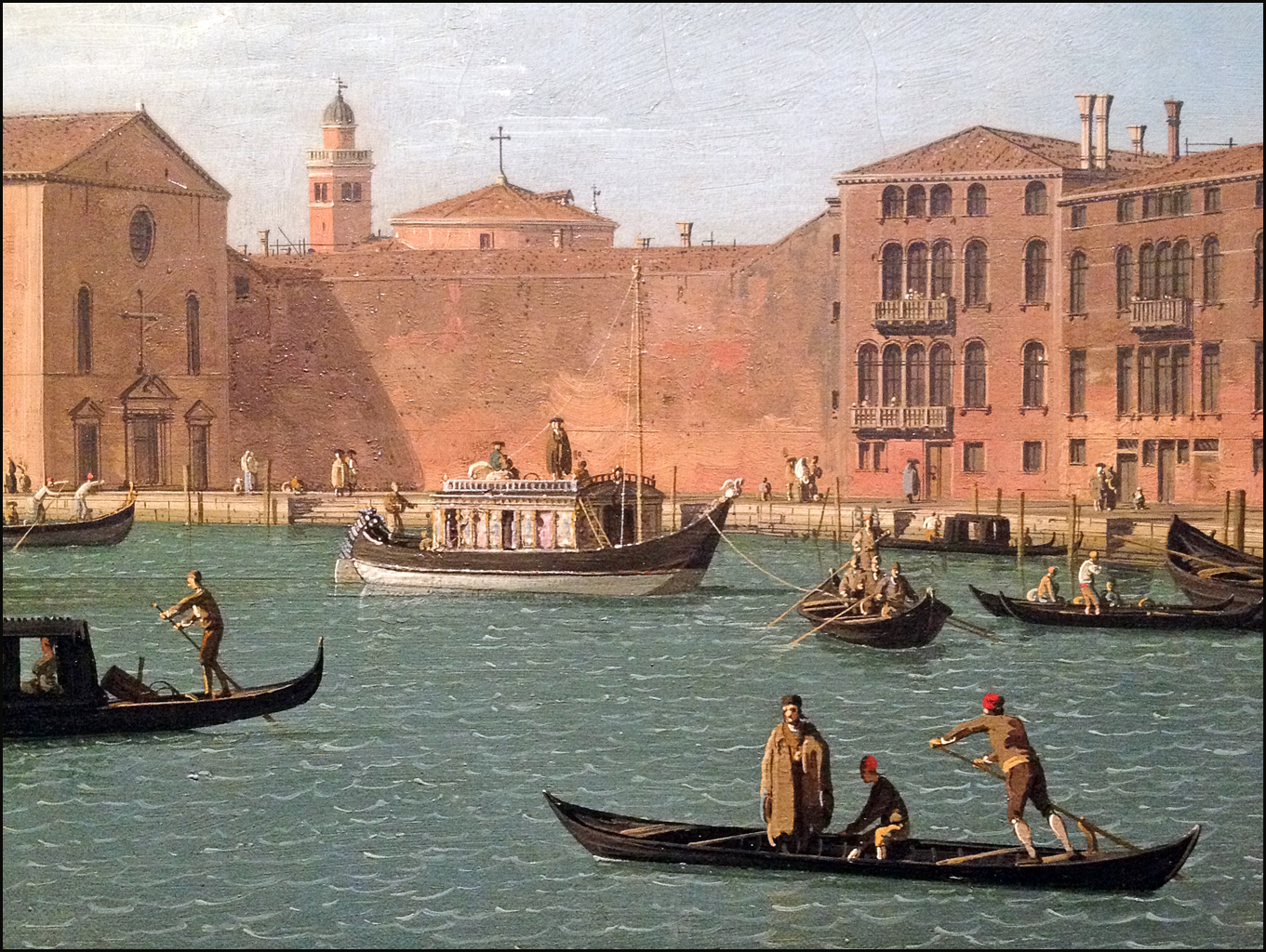 Au centre de cette toile peinte à l'époque où vivait Giacomo Casanova (1725-1798), se trouve un Burchiello, qui est un bateau couvert à rames assurant une navette quotidienne entre Venise et Padoue par le canal de la Brenta. Casanova empruntait le Burchiello dont une forme moderne existe toujours à Venise et qui propose plusieurs fois par semaine aux touristes de visiter les villas vénitiennes situées au bord de la Brenta.